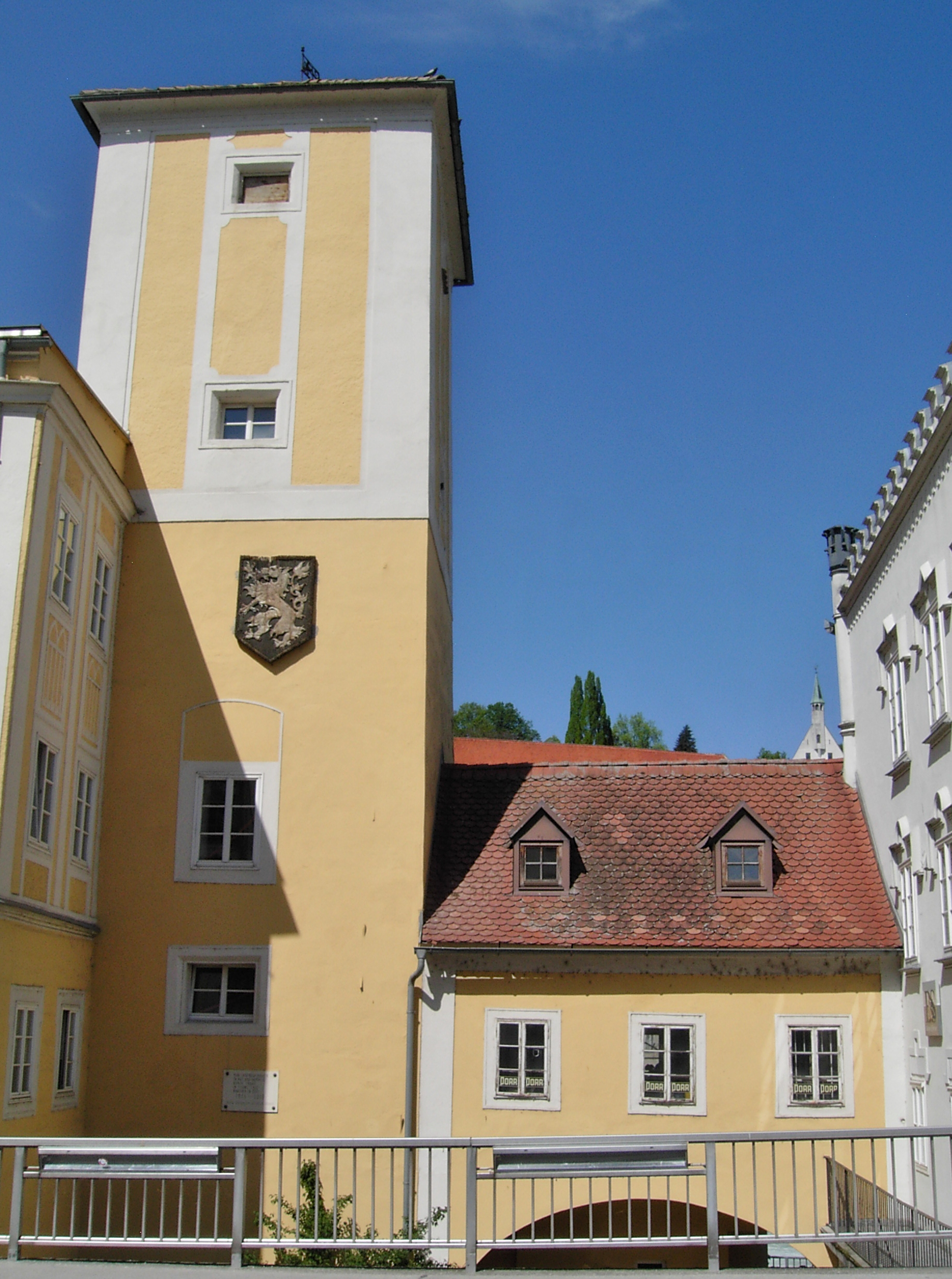 Steyr Zwischenbrücken 3, Wasserturm mit Anbau, Ansicht der Südfassade